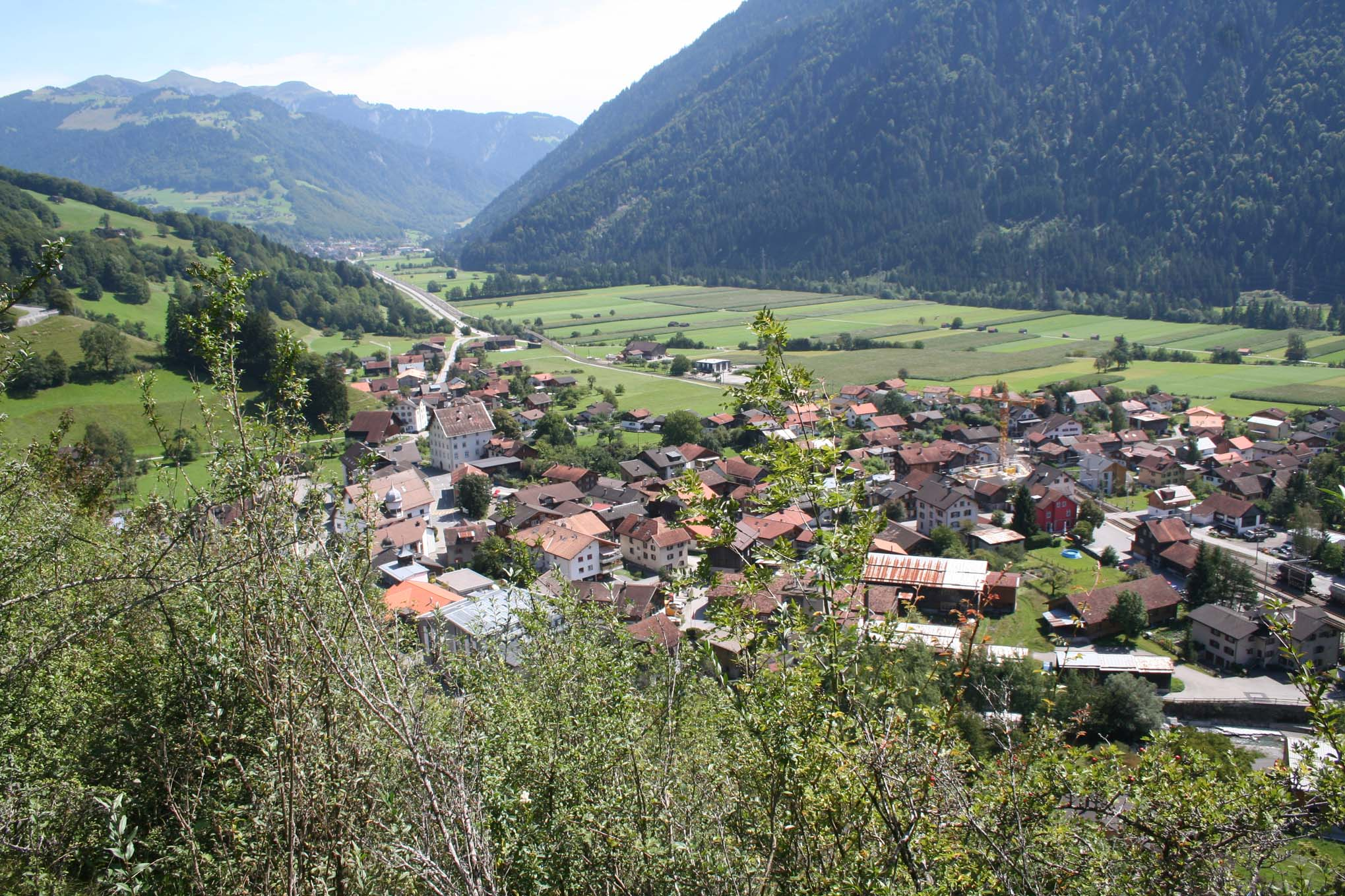 Grüsch